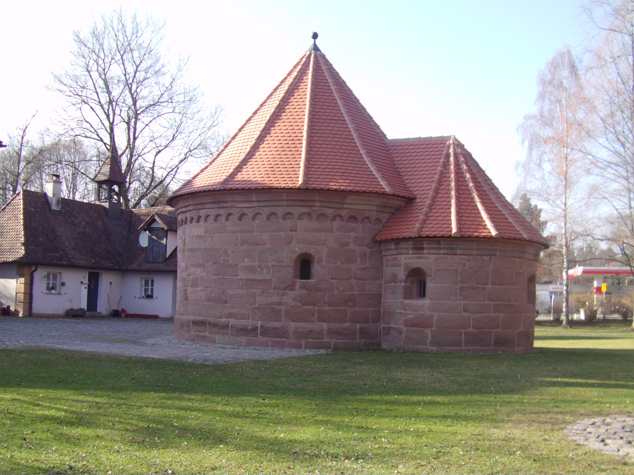 Romanische Rundkapelle Altenfurt (Nürnberg)